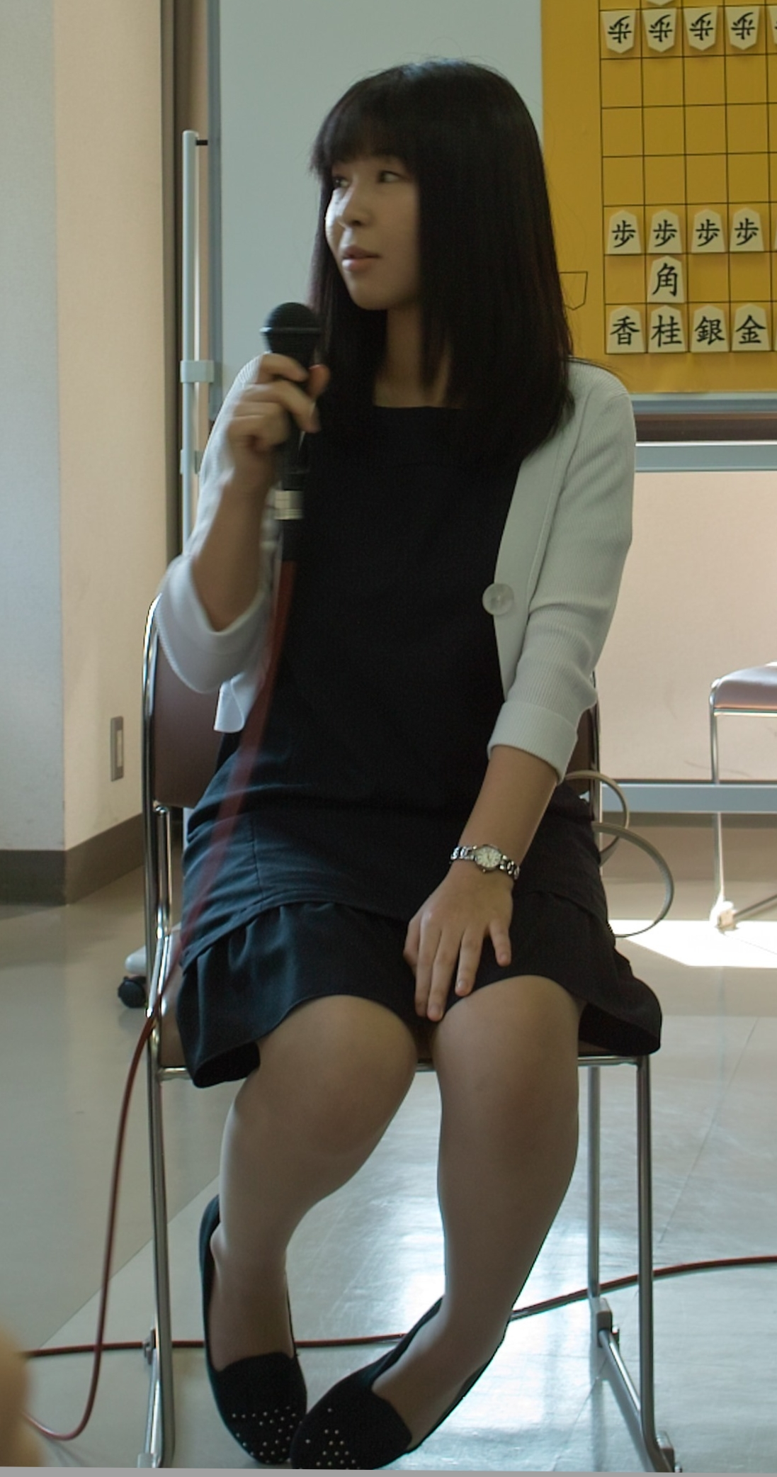 伊藤沙恵女流二段。2016年10月2日、棋士会みやぎ復興将棋フェスティバルにて。